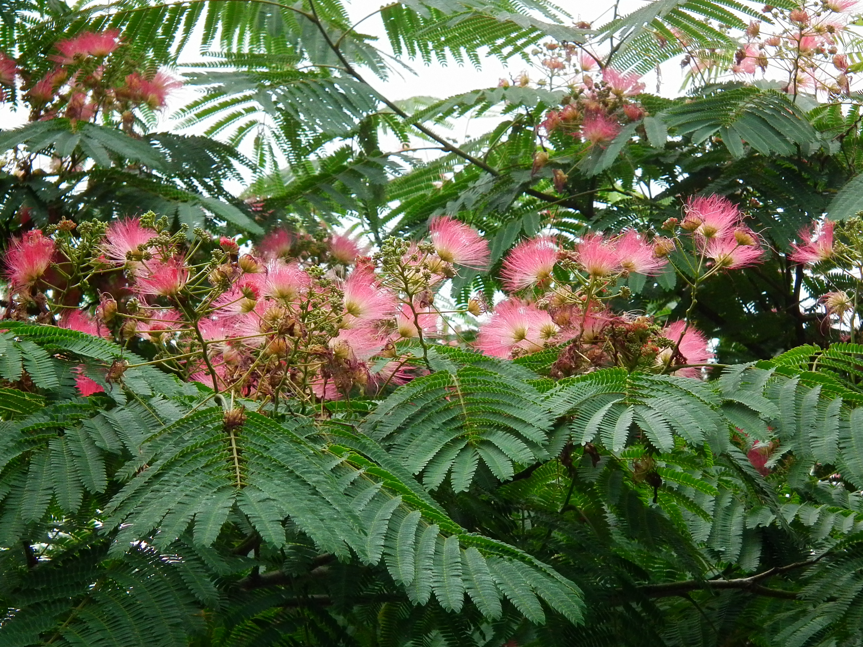 Blätter und Blüten eines Seidenbaums (Albizia julibrissin), fotografiert in Mannheim (Baden-Württemberg, Deutschland)